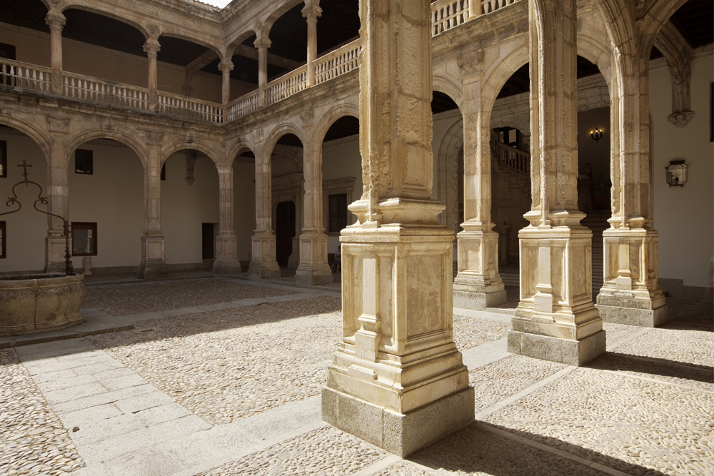 Patio del Palacio de Avellaneda, Peñaranda de Duero (Burgos).